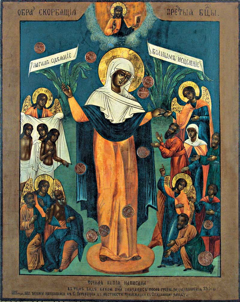 Икона богородицы "Всех скорбящих Радость" с грошиками. Our lady of all sorrowfull "with coins". Ярославский художественный музей, Ярославль, Россия/ Происходит из церкви Петра Митрополита г. Ярославля. Реставрировалась в 2002 г. Д. В. Мазновой. На нижнем поле иконы Ярославского музея находится надпись: «Точная копия написана в томъ виде какою она оказалась после грозы, разразившейся 23 июля 1888 года, над часовнею находящейся в С.-Петербурге въ местности прилежащей къ Стеклянному заводу». Судя по надписи на обороте, икона была написана в марте 1891 года, то есть вскоре после очередного чуда от образа в часовне при Стекольном заводе, где 17 февраля 1891 года была исцелена жена писаря Вера Белоногова. Икона была заказана священником ярославской церкви Петра Митрополита Иоанном Васильевичем Лапушинским столичному художнику Василию Васильевичу Васильеву (1829–1894).